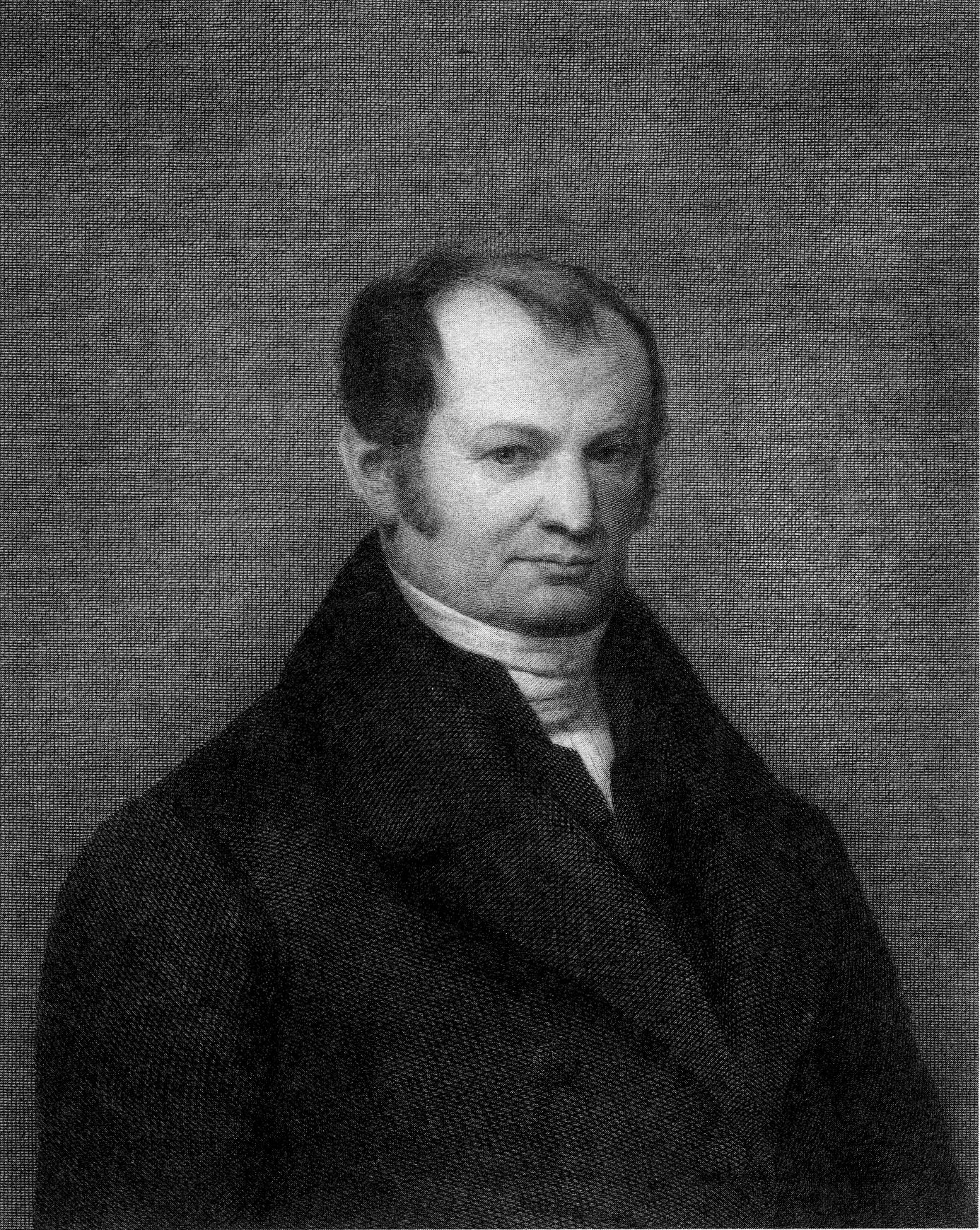 Stich von August Semmler (1825-93) nach dem Rumohr Porträt (ca. 1834, verschollen) von Robert Schneider (1809-1885)